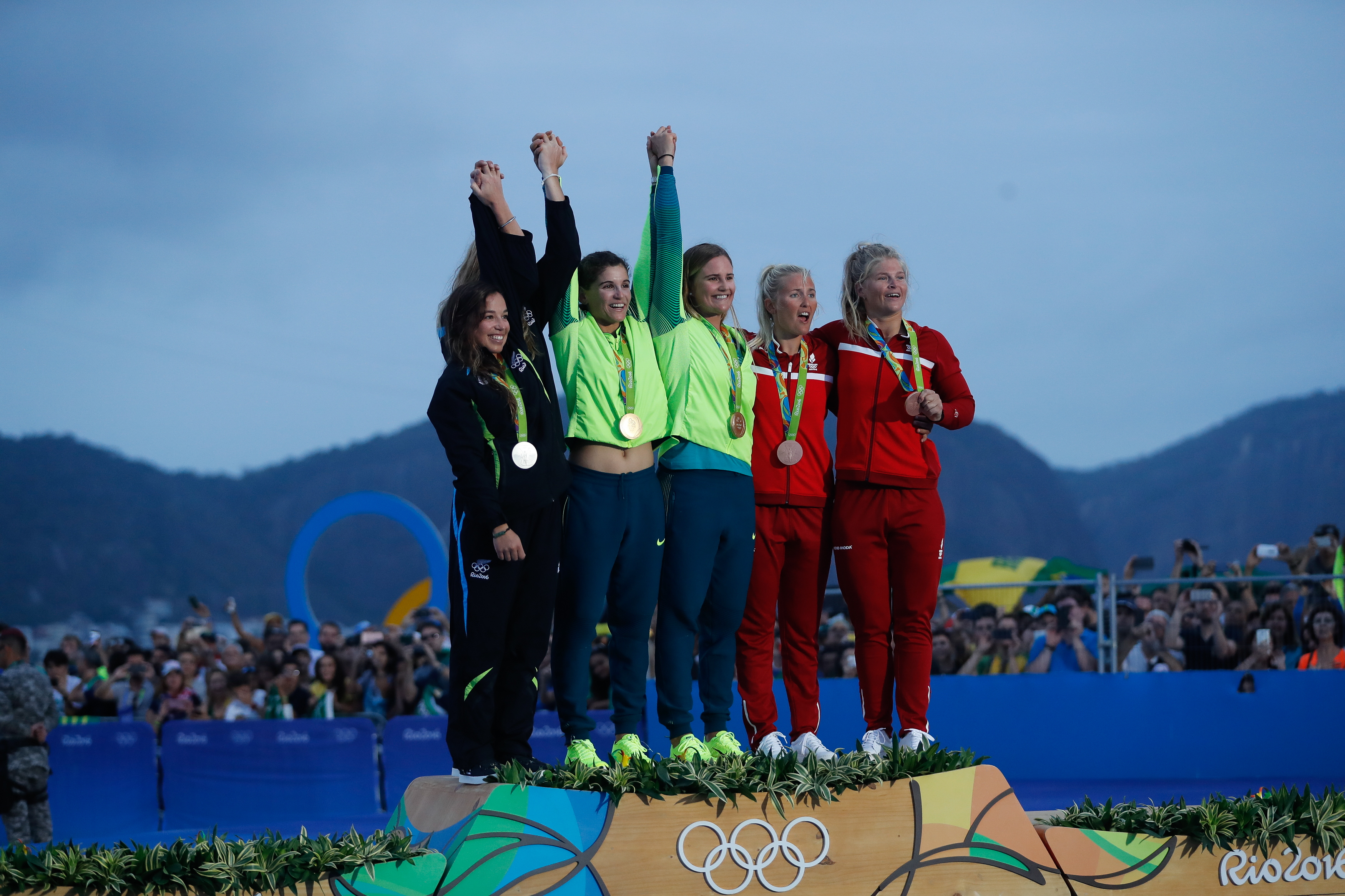 Rio de Janeiro - As brasileiras Martine Grael e Kahena Kunze conquistaram o ouro na classe 49er FX da vela dos Jogos Olímpicos Rio 2016, na regata final na Baía de Guanabara (Fernando Frazão/Agência Brasil)